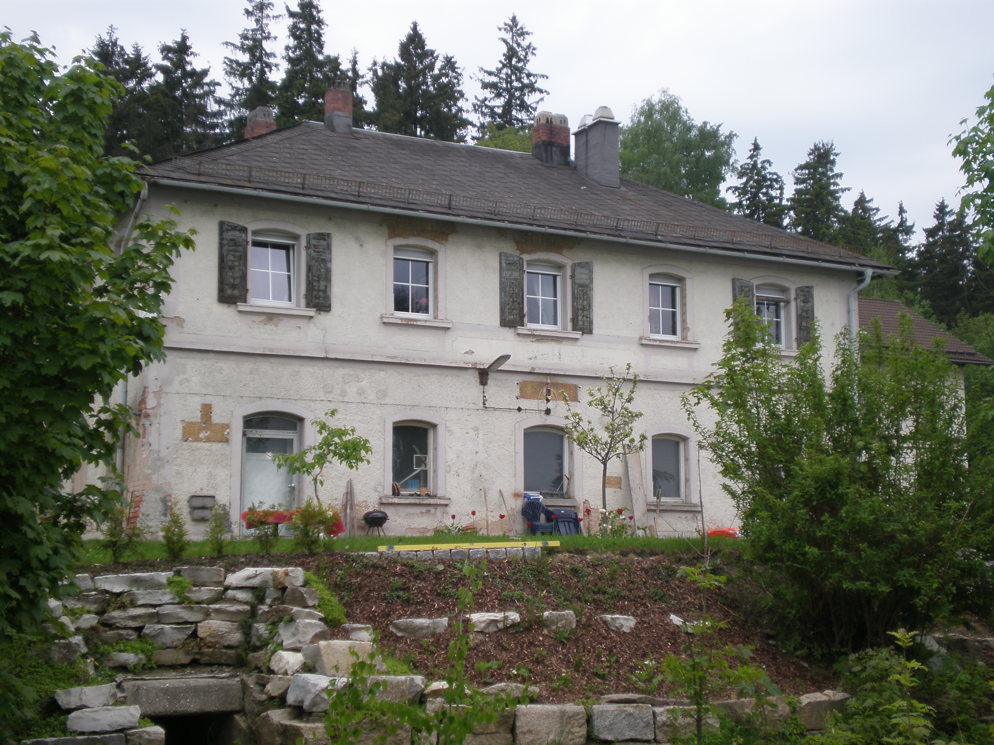 Das Bahnhofsgebäude in Gefrees OT Falls (Landkreis Bayreuth, Bayern)